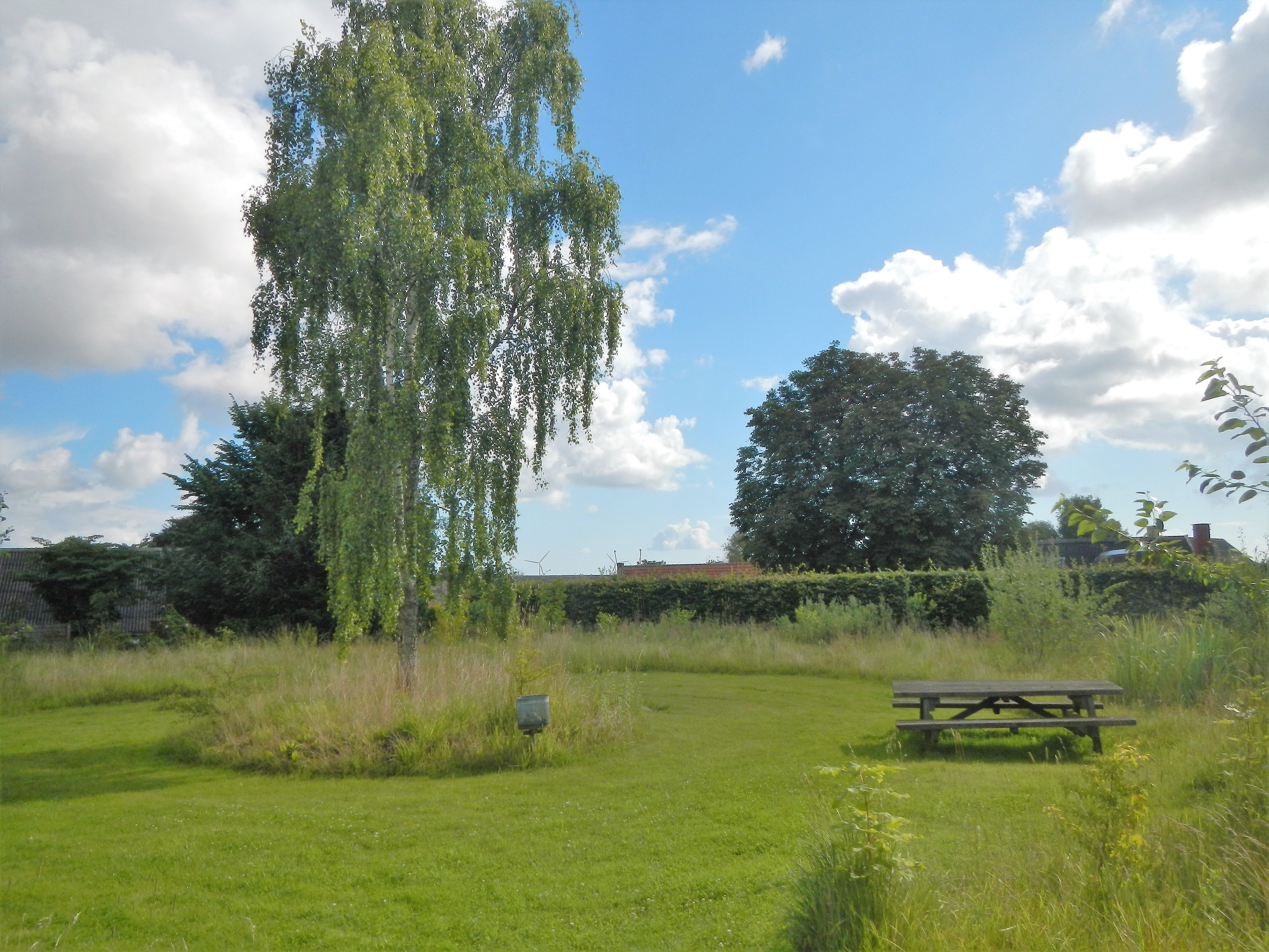 Byggetomt på Bakkegårdsvej 3, Veddum -nu Veddum Byskov